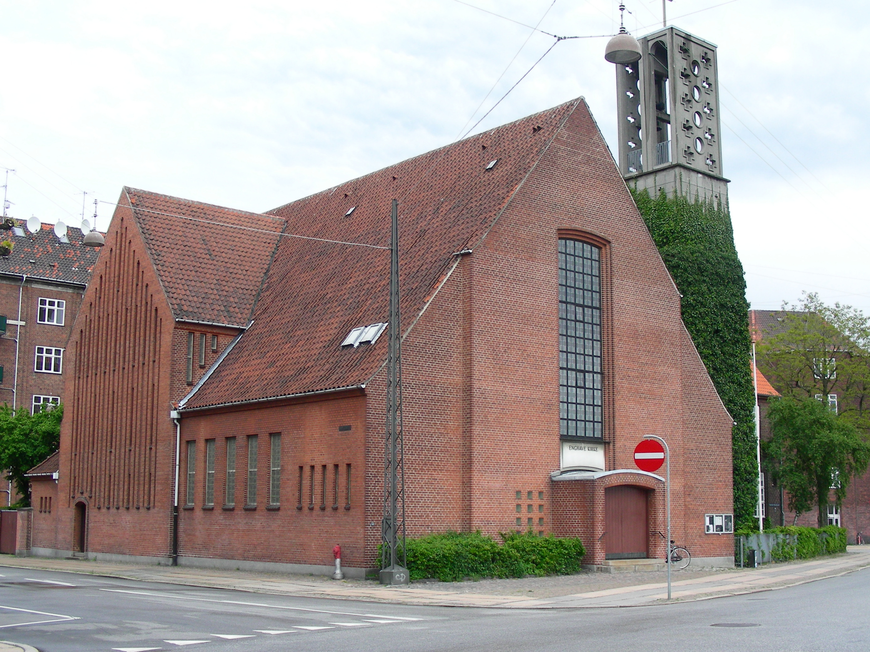 Enghave Kirke, Copenhagen, Denmark. Exterior 1